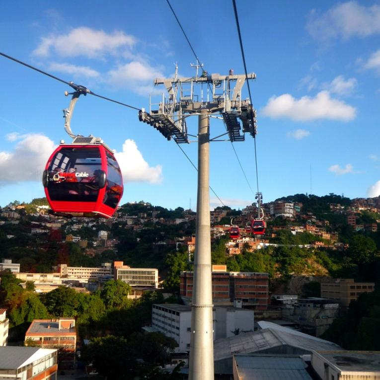 metrocable mariche